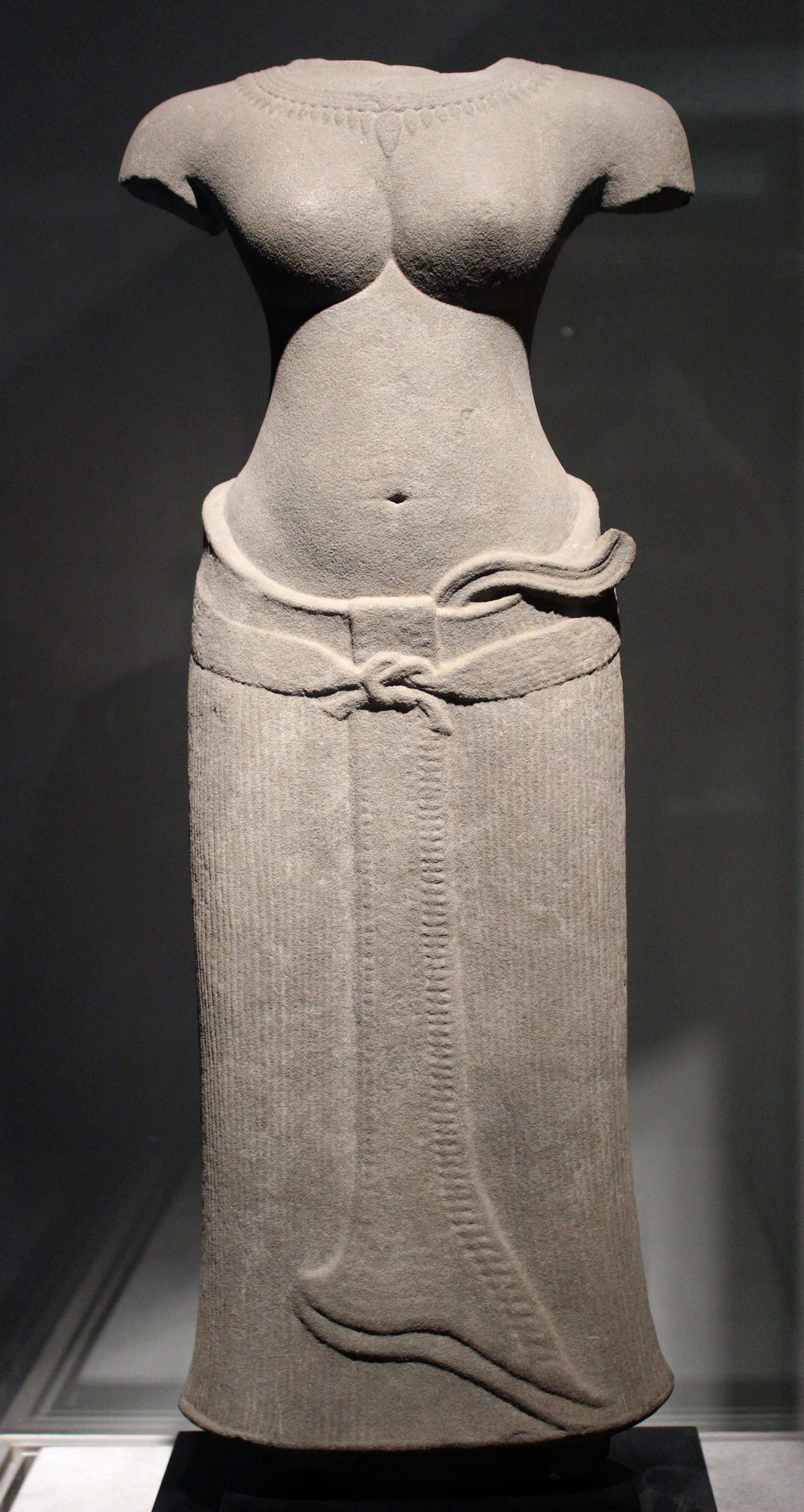 Musée Guimet. Arte de Camboya.